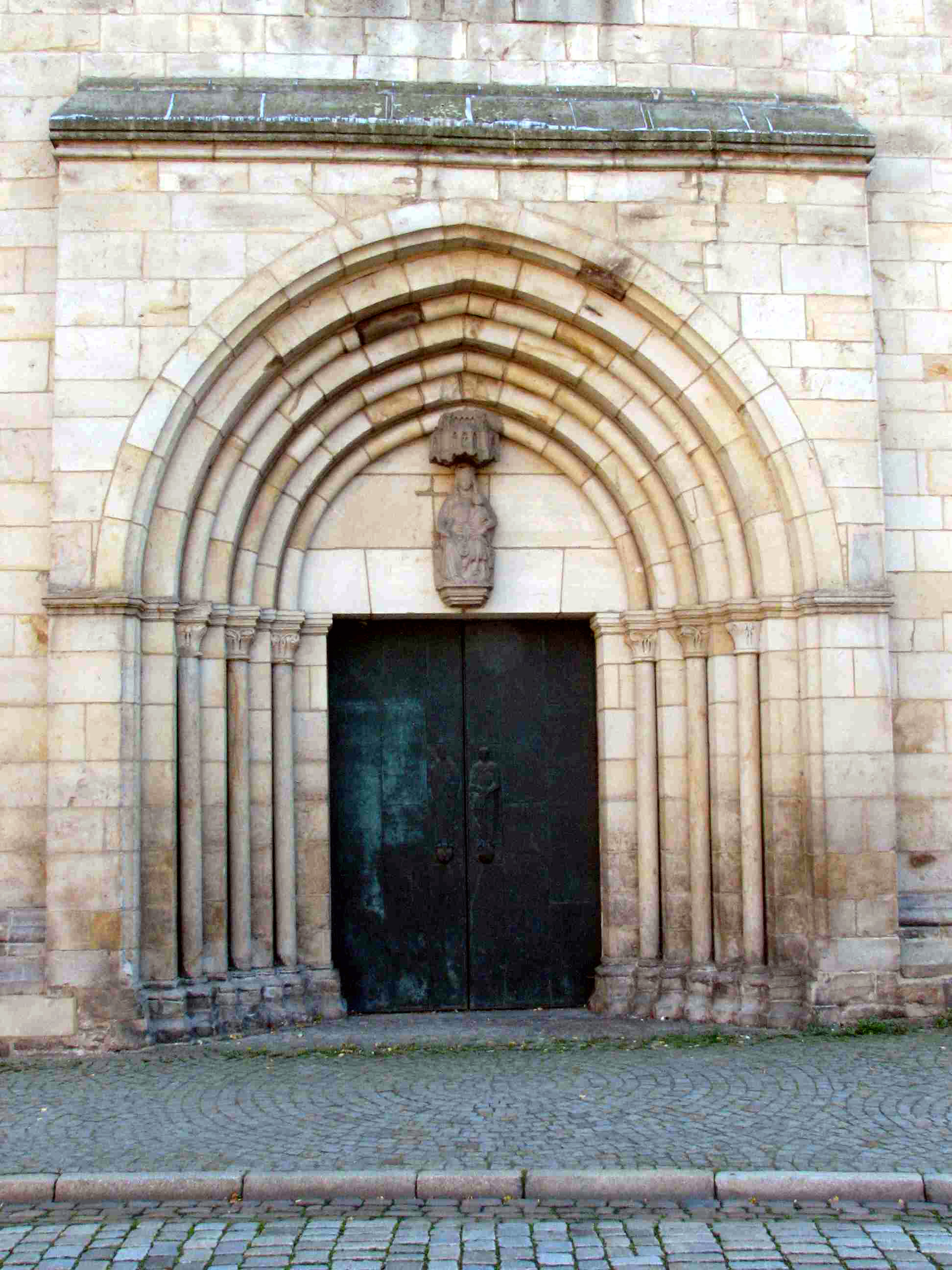 Der Bischofseingang am Dom zu Minden